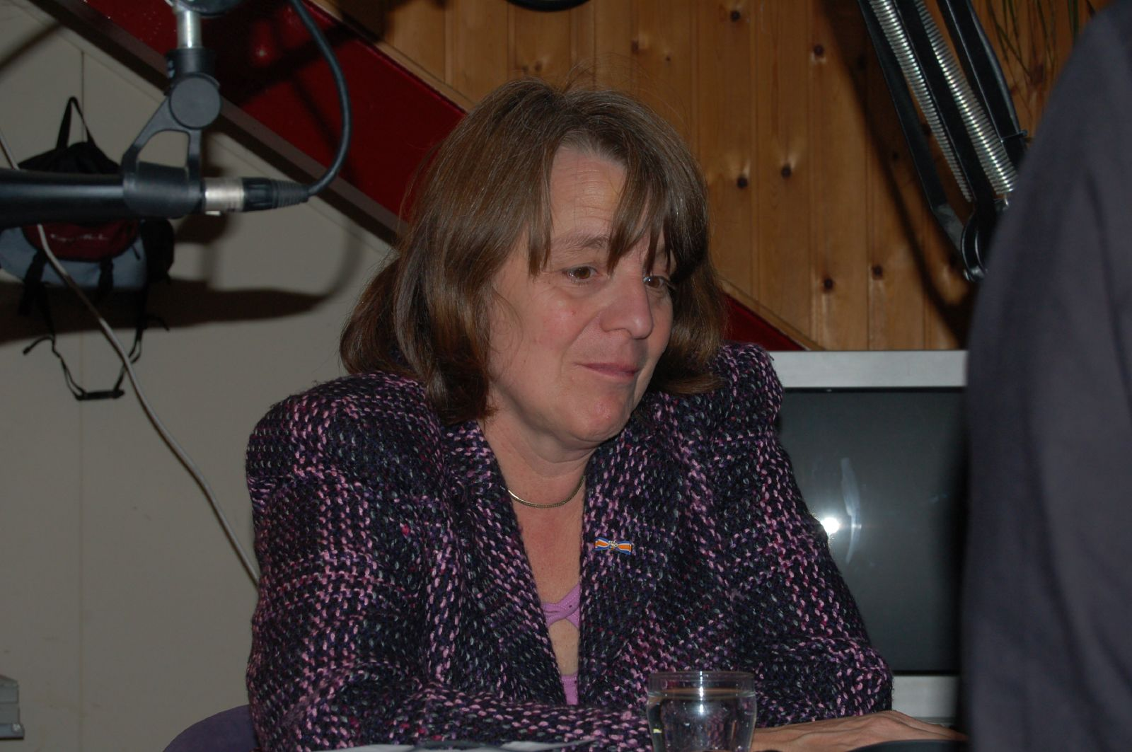 Helma Neppérus, nummer 15 op de lijst van de VVD, uit Voorschoten.